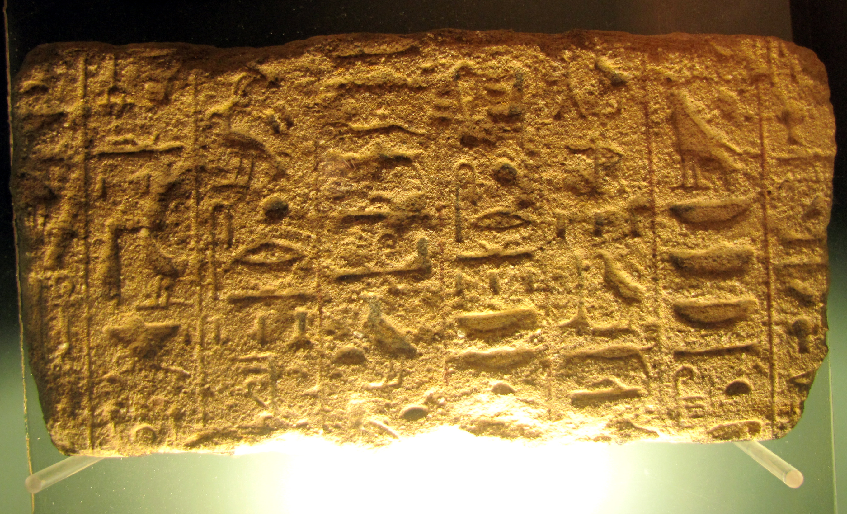 Una inscripción en el muro norte del corredor de entrada al templo que relata la apertura de un pozo de agua en el camino del desierto oriental que conduce a las minas de oro del Vadi Alaki. Museo de Ciencias Naturales de La Plata.